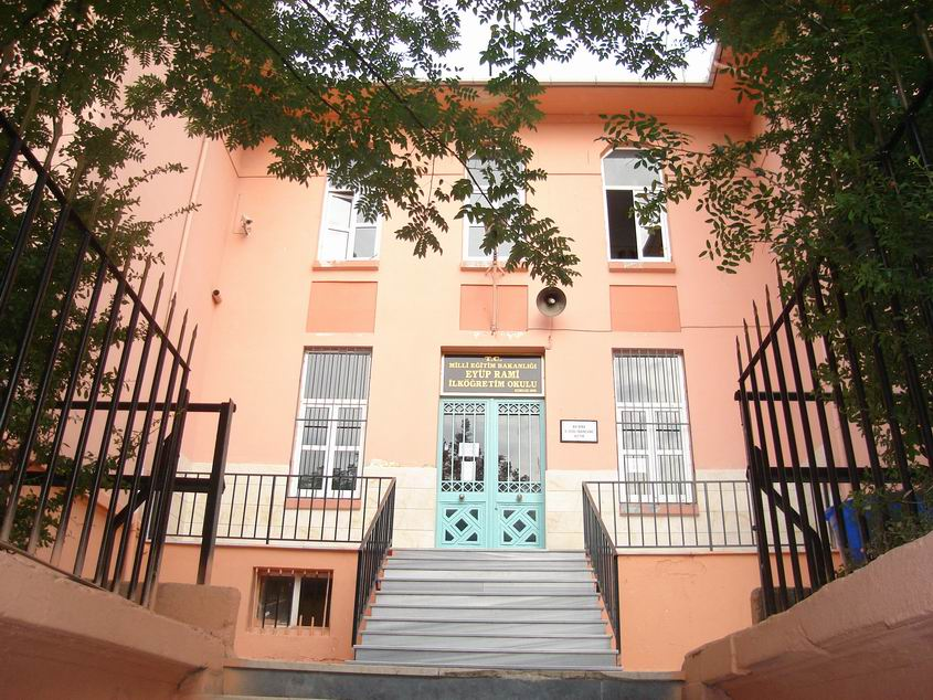 Rami İlköğretim Okulu A Blok (eski bina) ön kapısı